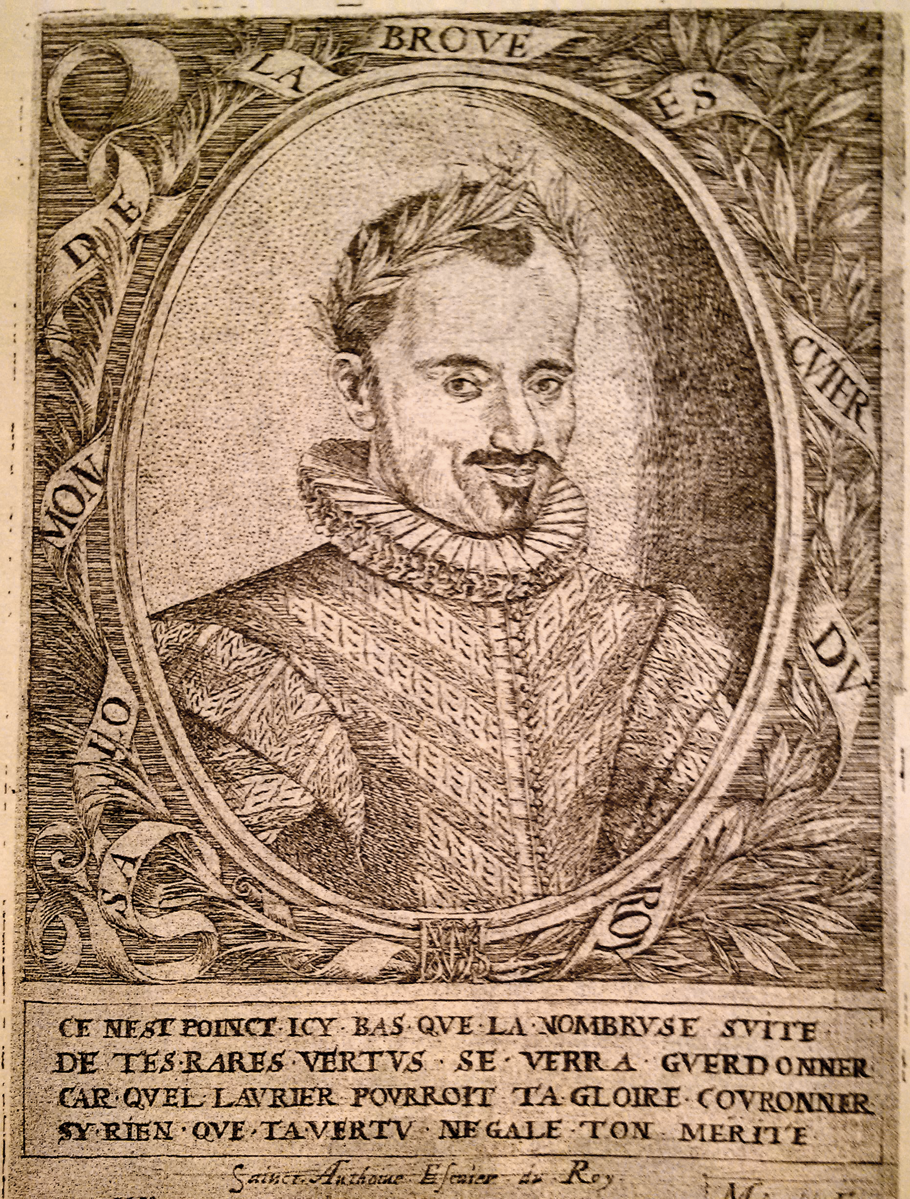 GRAVURE DE SALOMON DE LA BROUE - EXTRAIT DU LIVRE "DES PRECEPTES DU CAVALERICE FRANCOIS"